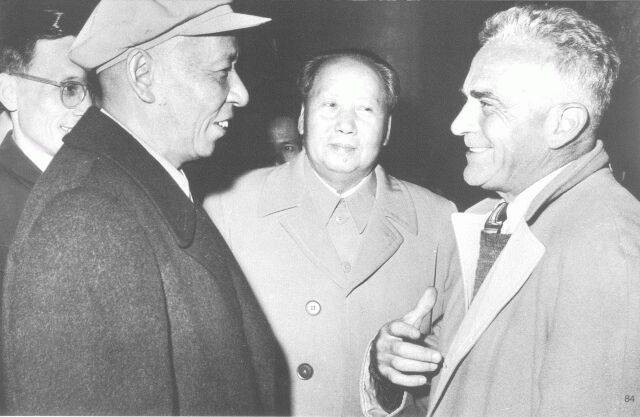 1960年10月，刘少奇、毛泽东同美国著名作家、记者埃德加·斯诺亲切交谈。